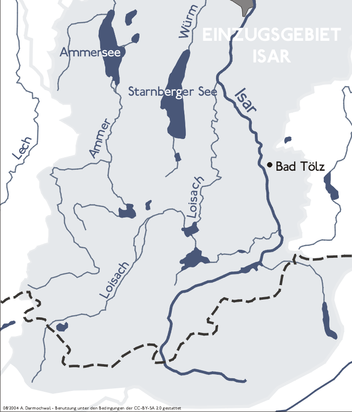 Carte du cours de la Loisach (Autriche et Allemagne)